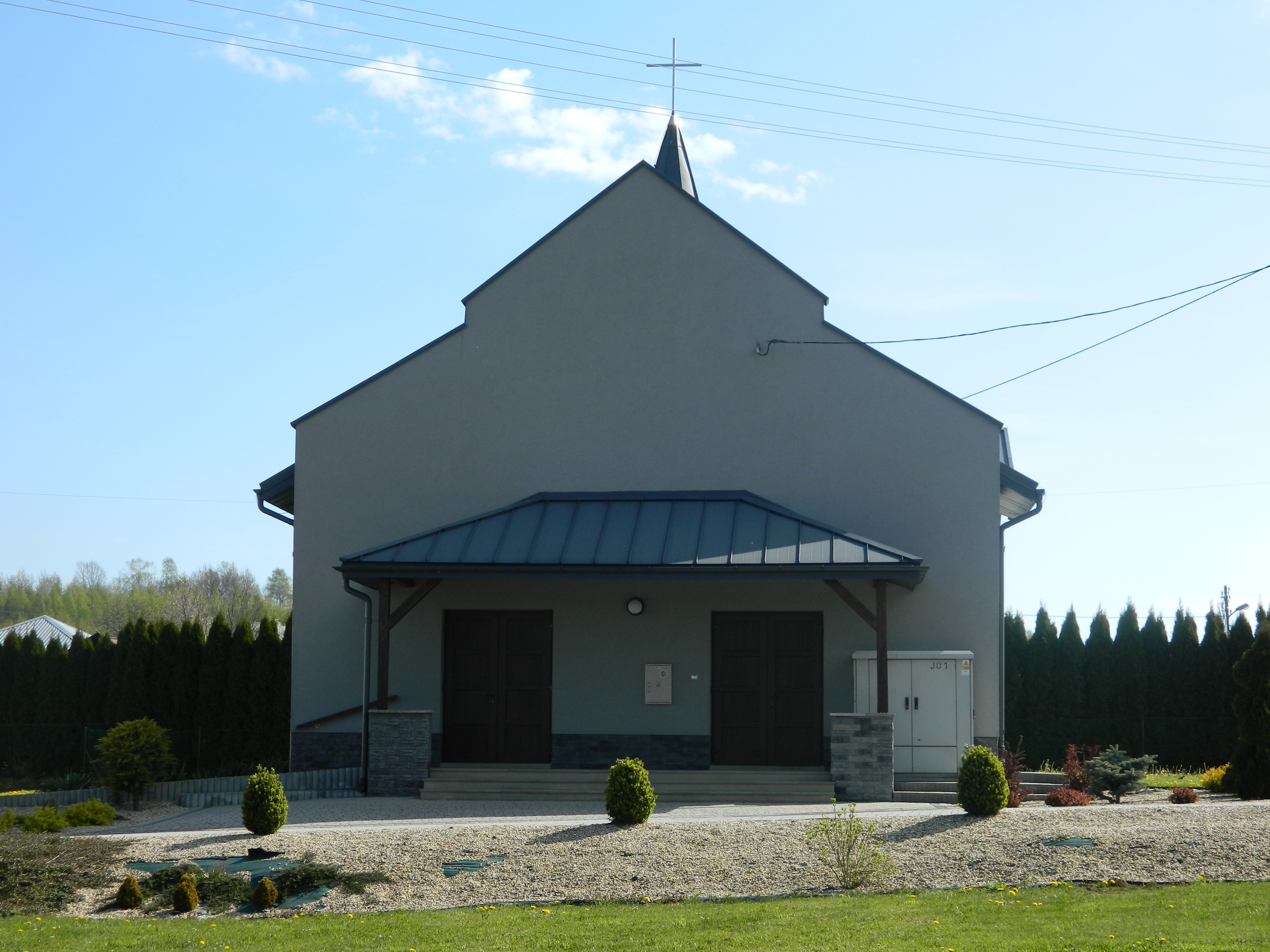 Kaplica pogrzebowa wybudowana przy kościele w Turzym Polu w latach 2014-2017